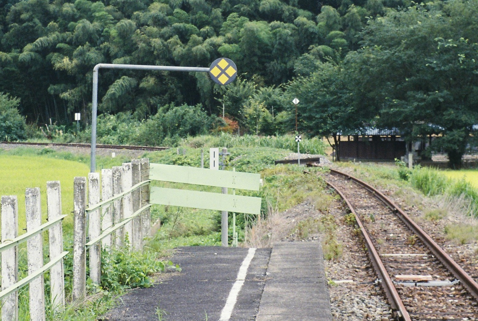 一乗谷駅の九頭竜湖方車止め（2004年から2007年まで不通であったため設置）